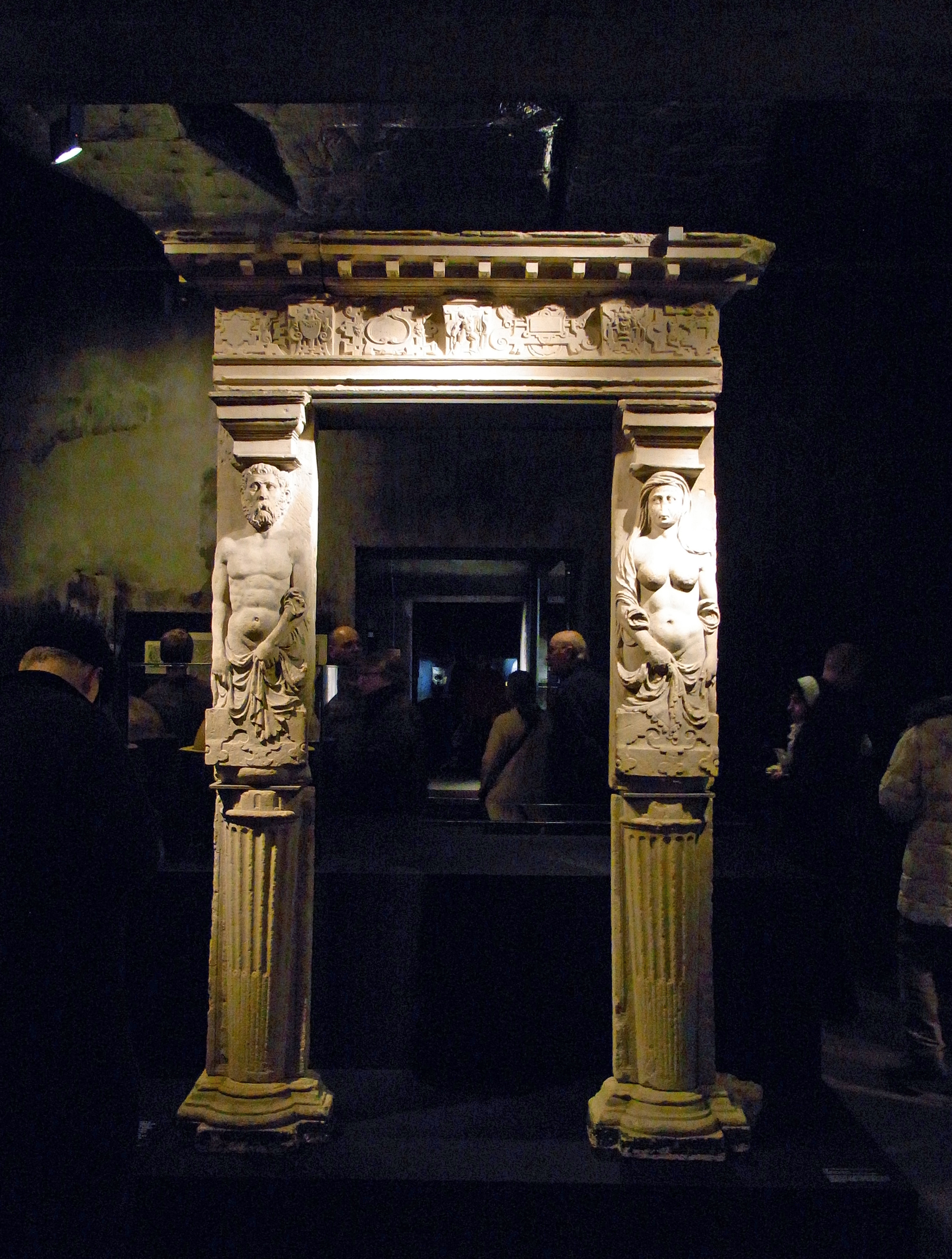 Türgewände von Schloss Horst aus Baumberger Sandstein im Ruhr Museum, ca. 1566